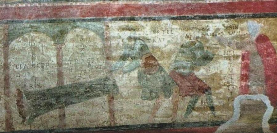 Fresko in Unterkirche von San Clemente in Rom